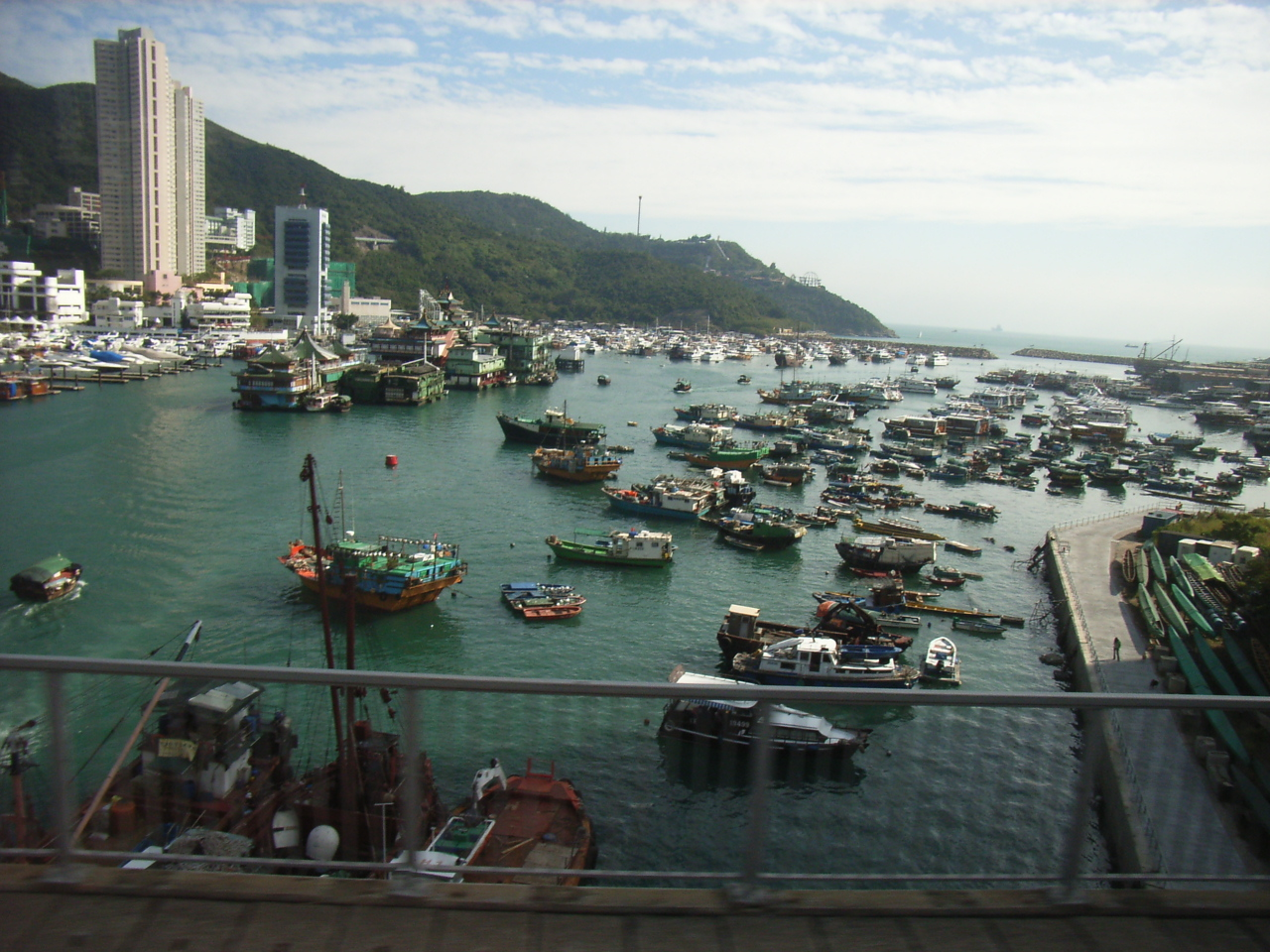 Aberdeen South Typhoon Shelter and Ap Lei Chau Bridge, Hong Kong 鴨脷洲大橋, 石排灣, 香港仔南避風塘 Photographer:User:Apade1872